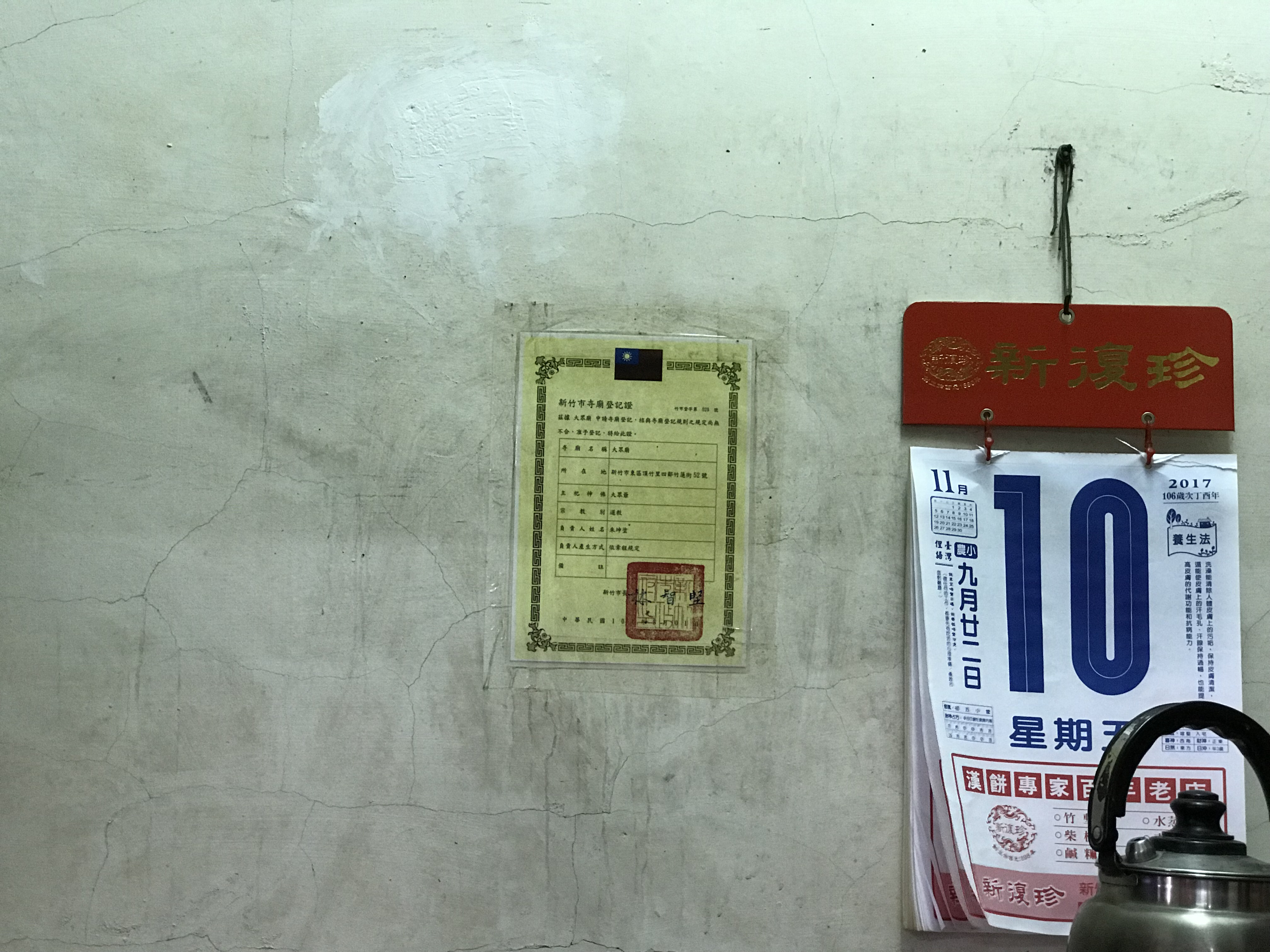 南壇大眾廟新竹市寺廟登記證與新復珍餅店日曆。